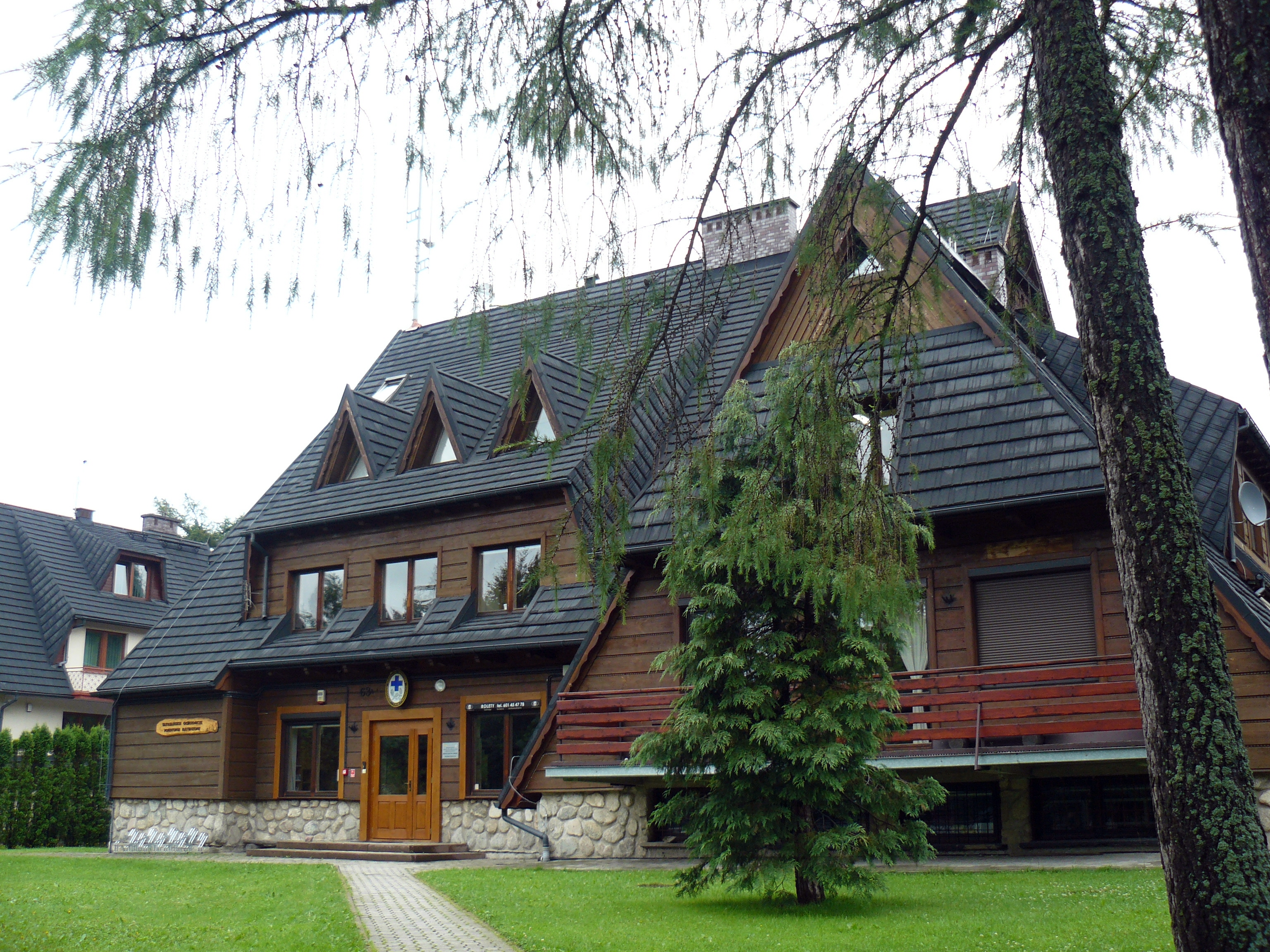 Budynek Tatrzańskiego ochotniczego Pogotowia Ratunkowego w Zakopanem, ul Piłsudskiego 63A